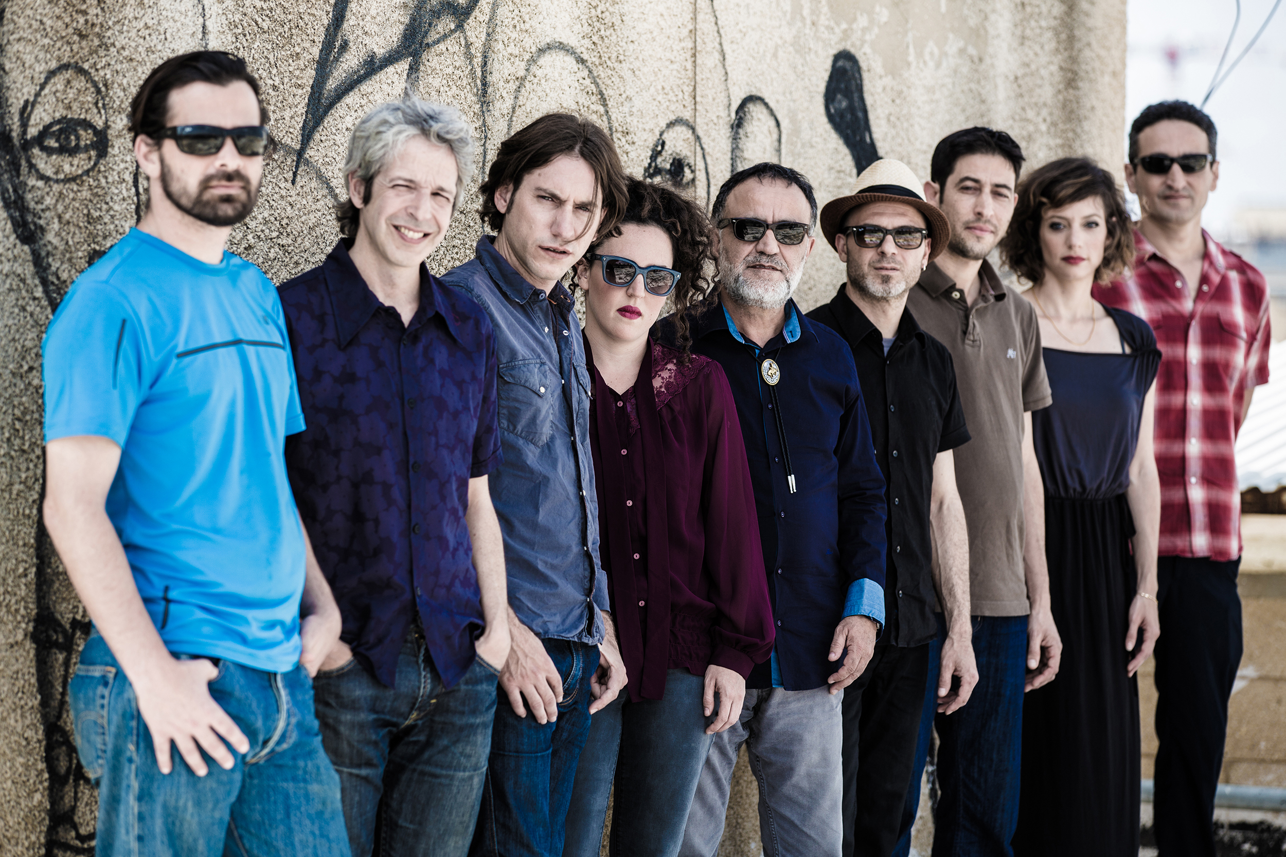 אהוד בנאי עם ההרכב הקבוע: גיל סמטנה – הפקה מוסיקלית ובס, ערן פורת – תופים, נושי פז – גיטרות, ניצן – חן רזאל – כינור, אלעד כהן – בונן – כלי הקשה וסאמפלר, ביל צור – קלידים. אליהם הצטרפו: מאיה בלזיצמן - צ`לו ושירה, גליה חי - ויולה וקולות.